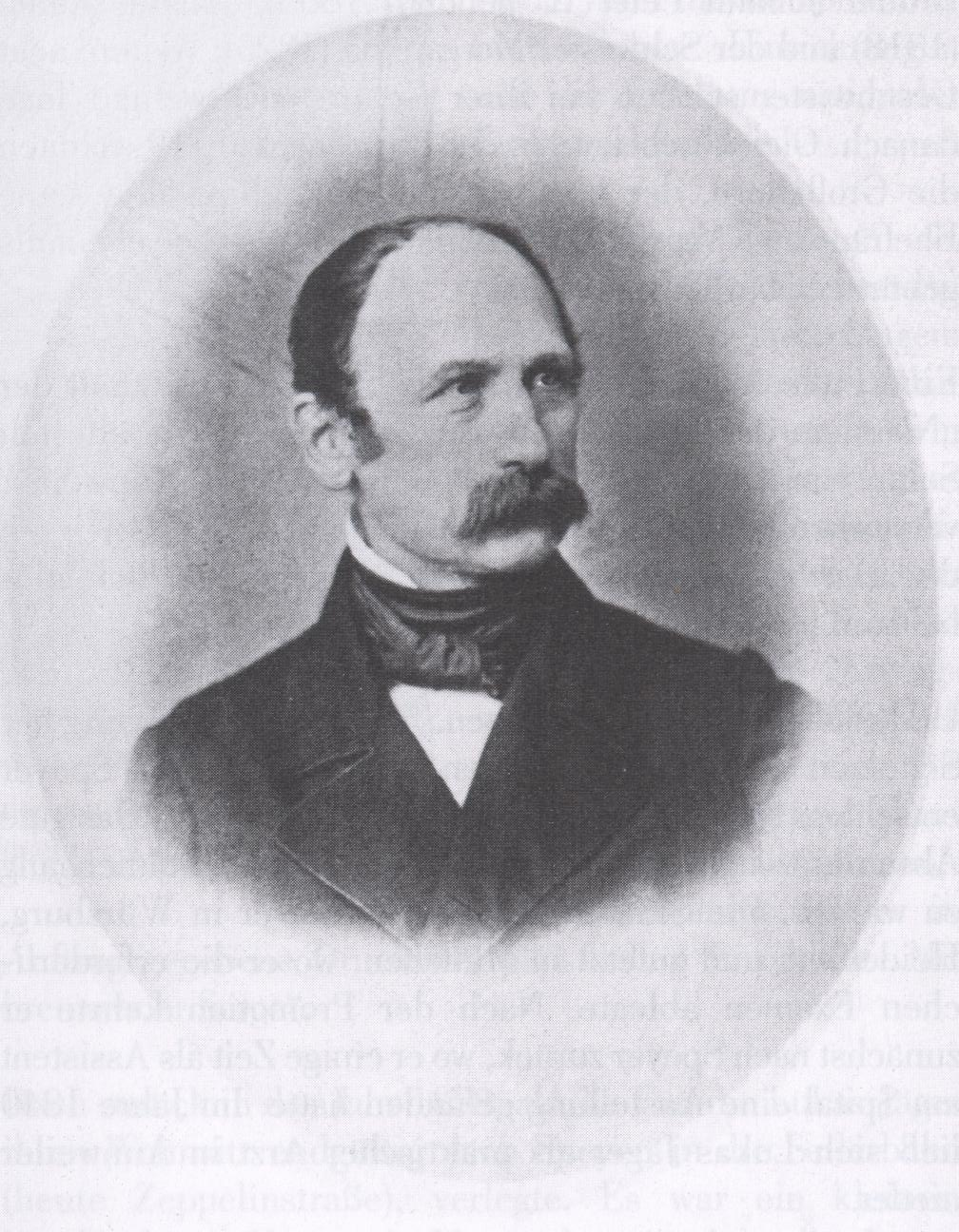 Johann Lukas Jäger, Speyer, Bayerischer Landtagsabgeordneter